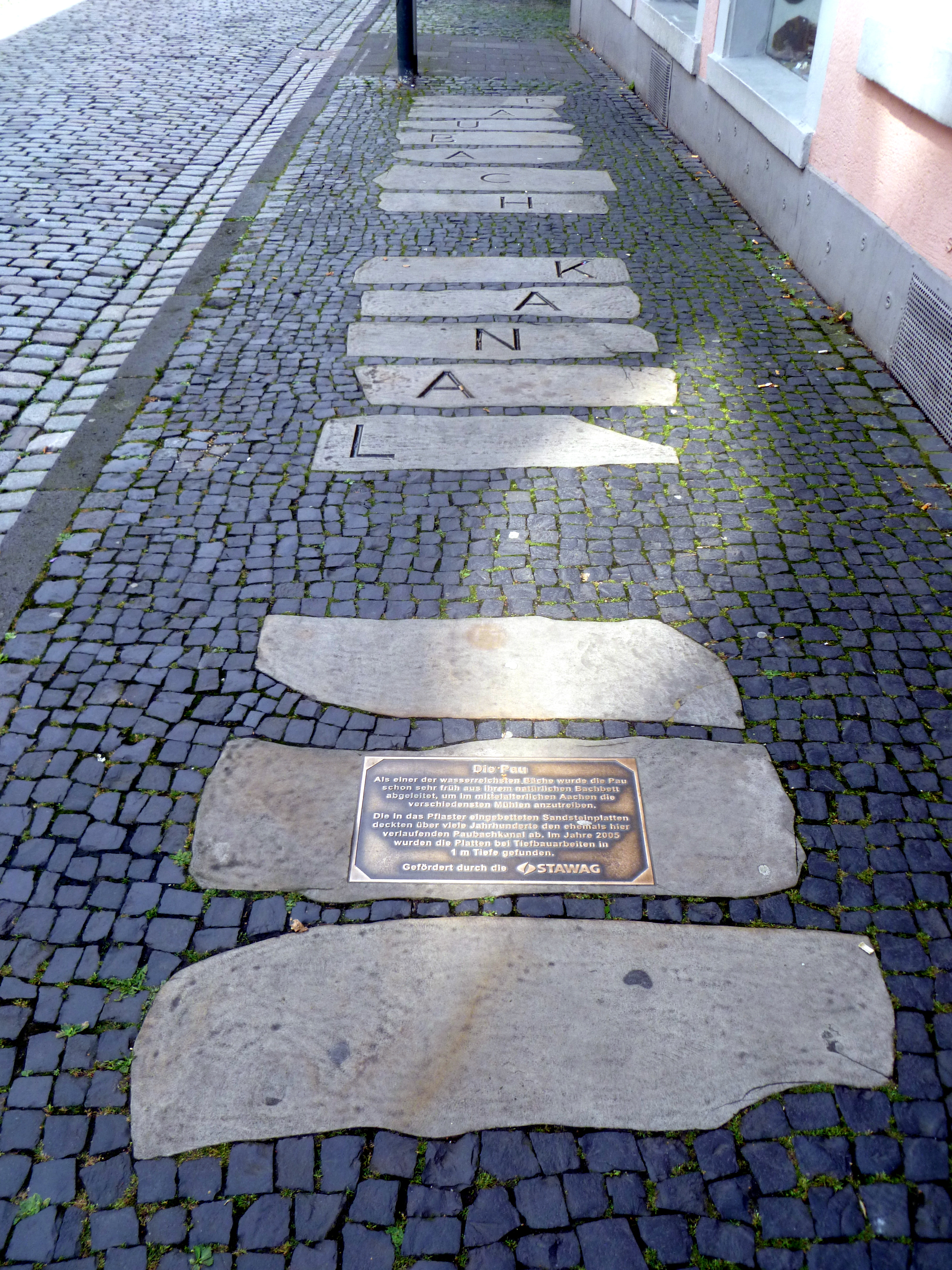 Kennzeichnung des unterirdischen Verlaufs des Paubachs in der Klappergasse